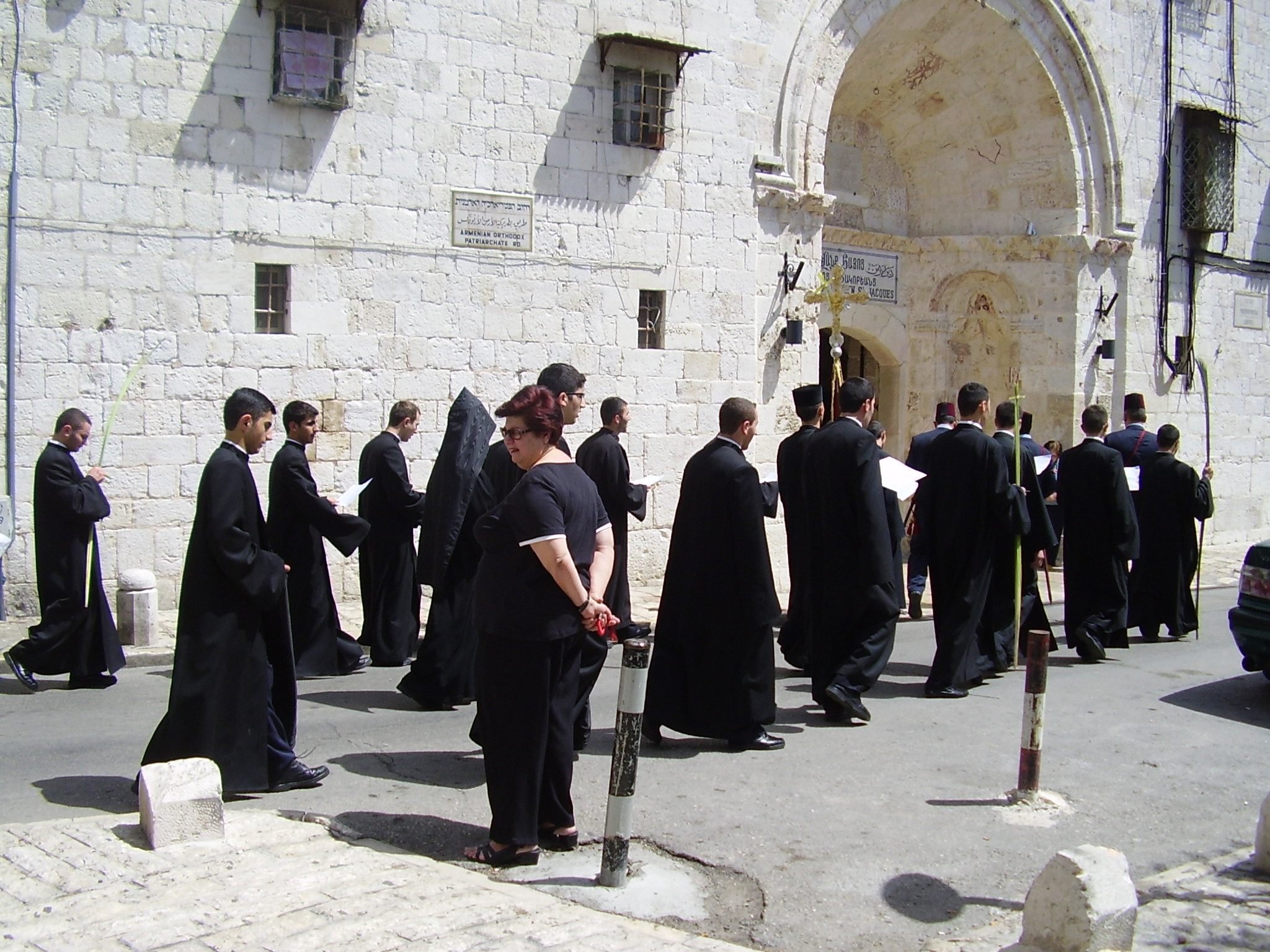 הפטריארכיה הארמנית שוכנת במבנה הגדול והחשוב בבנייני הרובע הארמני בעיר העתיקה של ירושלים.